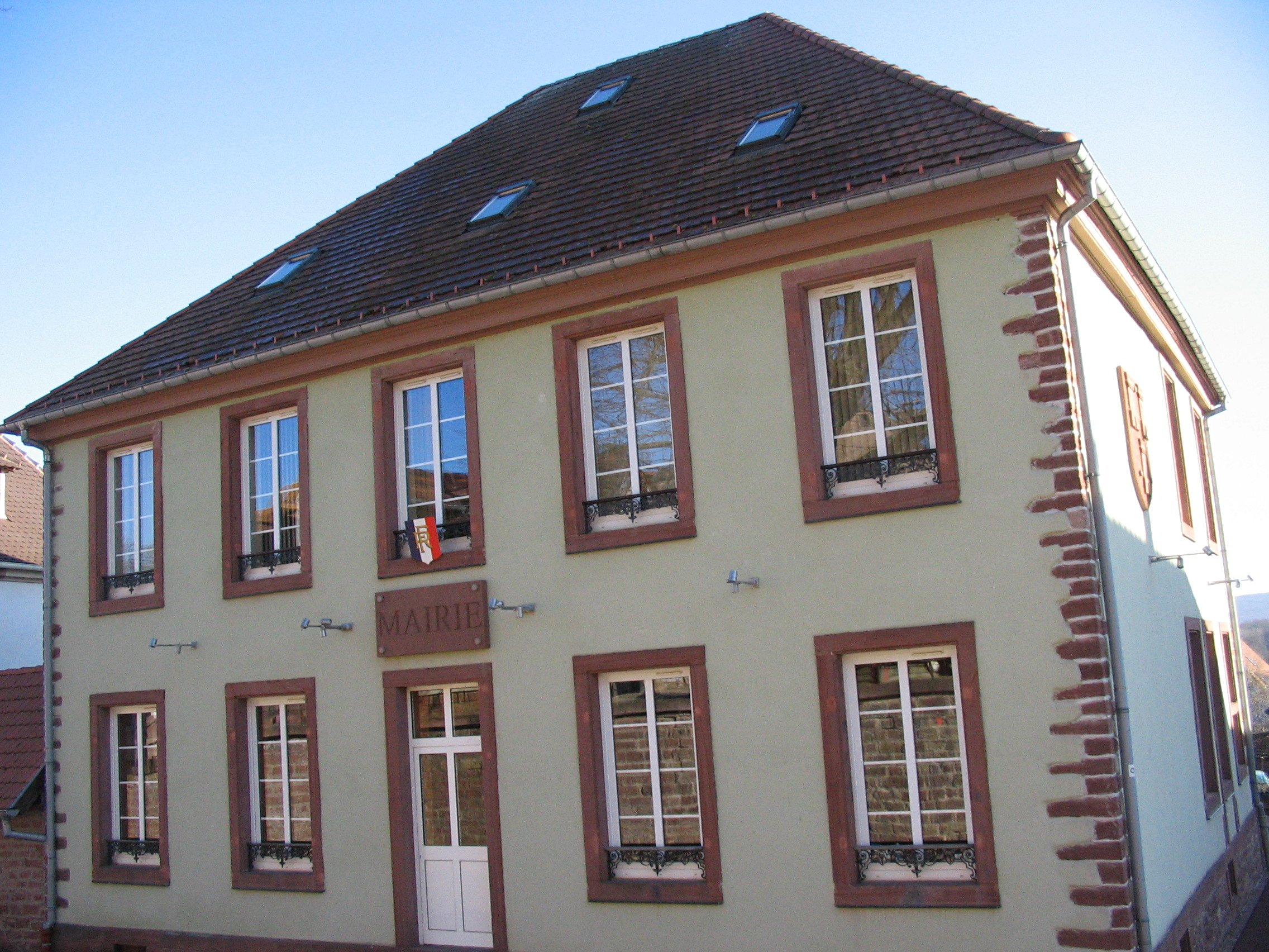 Mairie d'Allenwiller